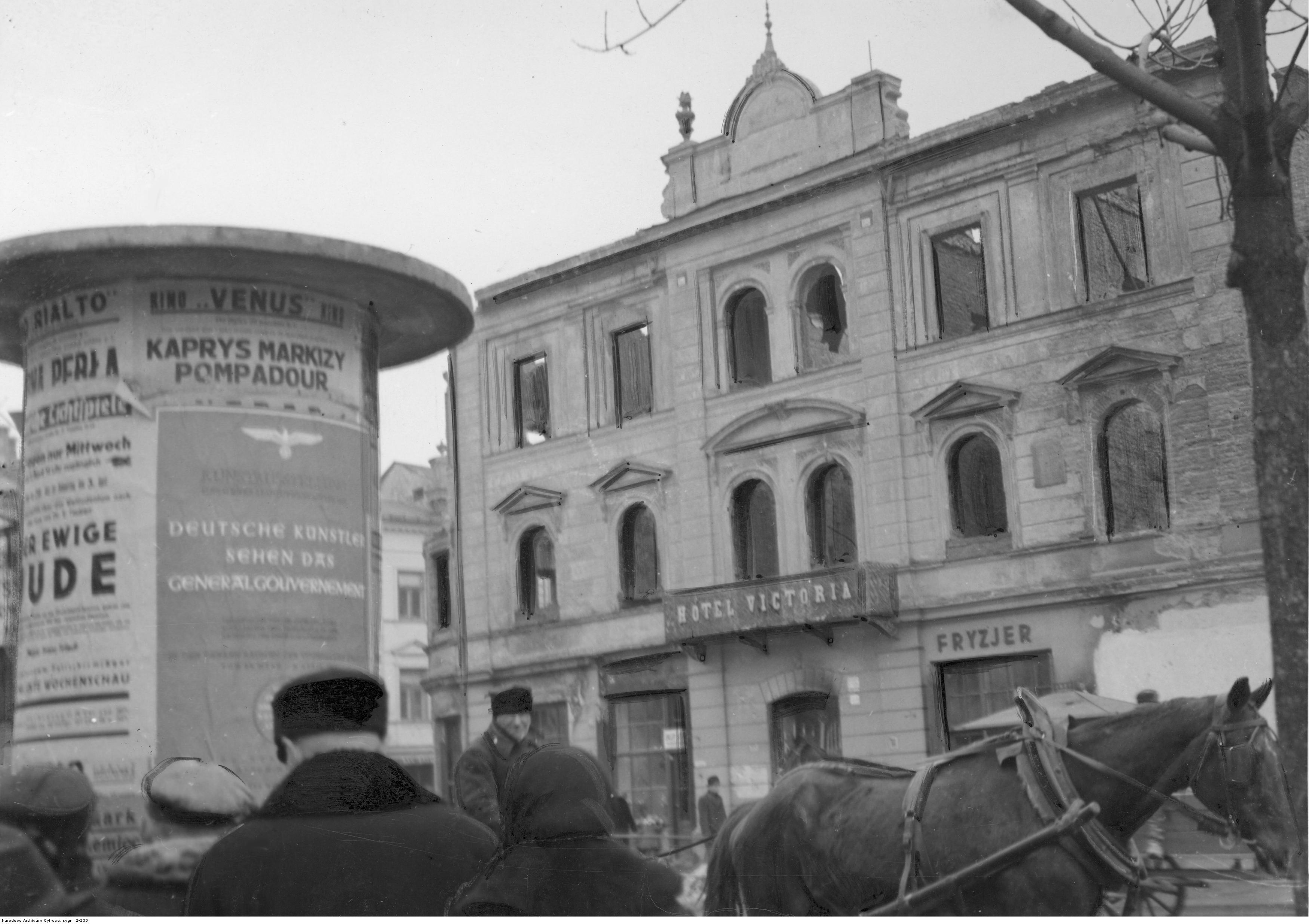 Zniszczony budynek hotelu Victoria. Widoczny słup ogłoszeniowy.